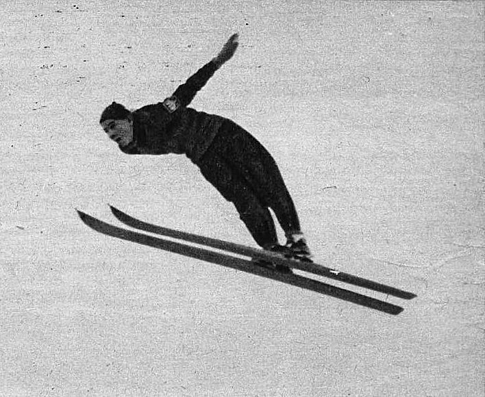 Jan Kula podczas skacze 85m podczas mistrzostw świata FIS w Zakopanem 1939